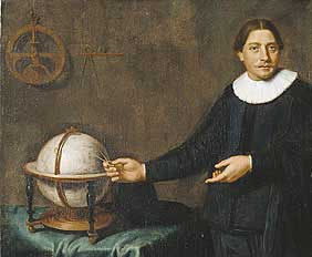 detail